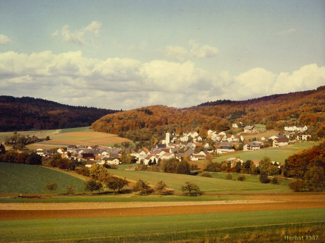 Bild von Herzhausen, aufgenommen im Herbst 1987, Eigenes Foto aus Fotoalbum, selbst Fotografiert